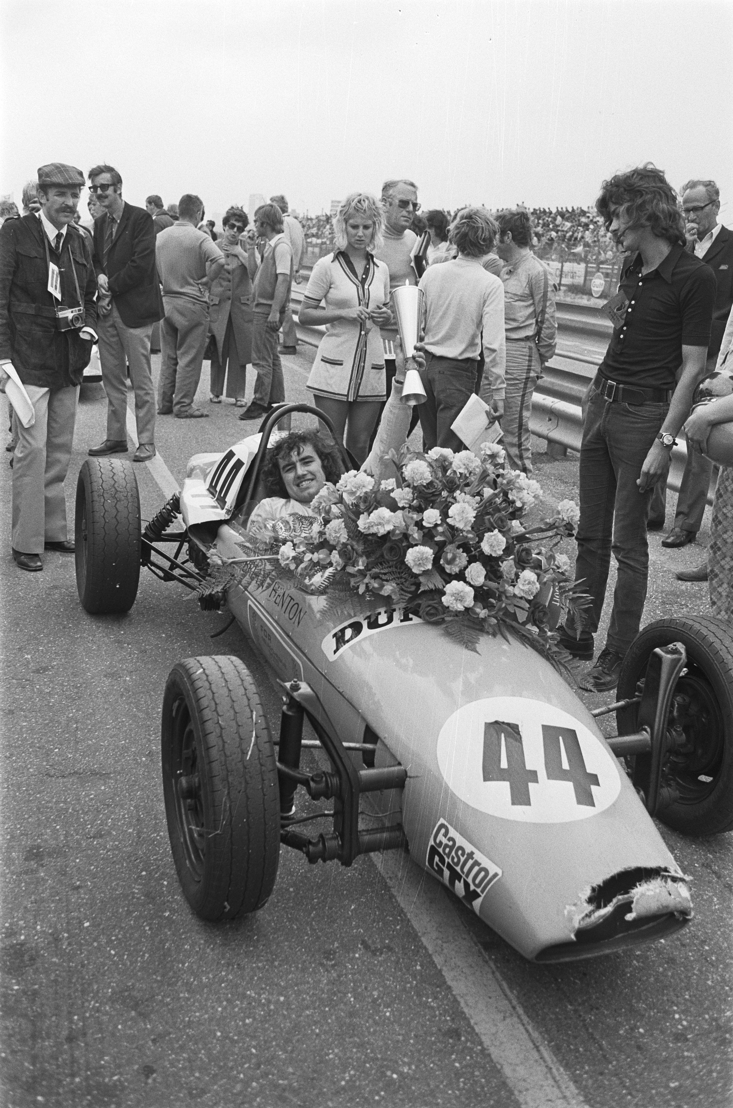 Collectie / Archief : Fotocollectie Anefo Reportage / Serie : [ onbekend ] Beschrijving : Internationale Formule Vee autoraces, Zandvoort Datum : 8 augustus 1971 Locatie : Noord-Holland, Zandvoort Trefwoorden : AUTORACES Fotograaf : Peters, Hans / Anefo Auteursrechthebbende : Nationaal Archief Materiaalsoort : Negatief (zwart/wit) Nummer archiefinventaris : bekijk toegang 2.24.01.05 Bestanddeelnummer : 924-7995